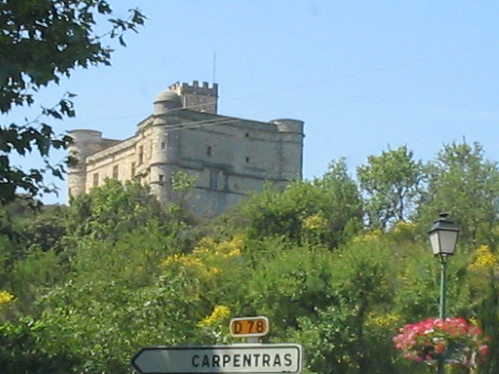 Château du Barroux, in the Vaucluse, France, june 2005